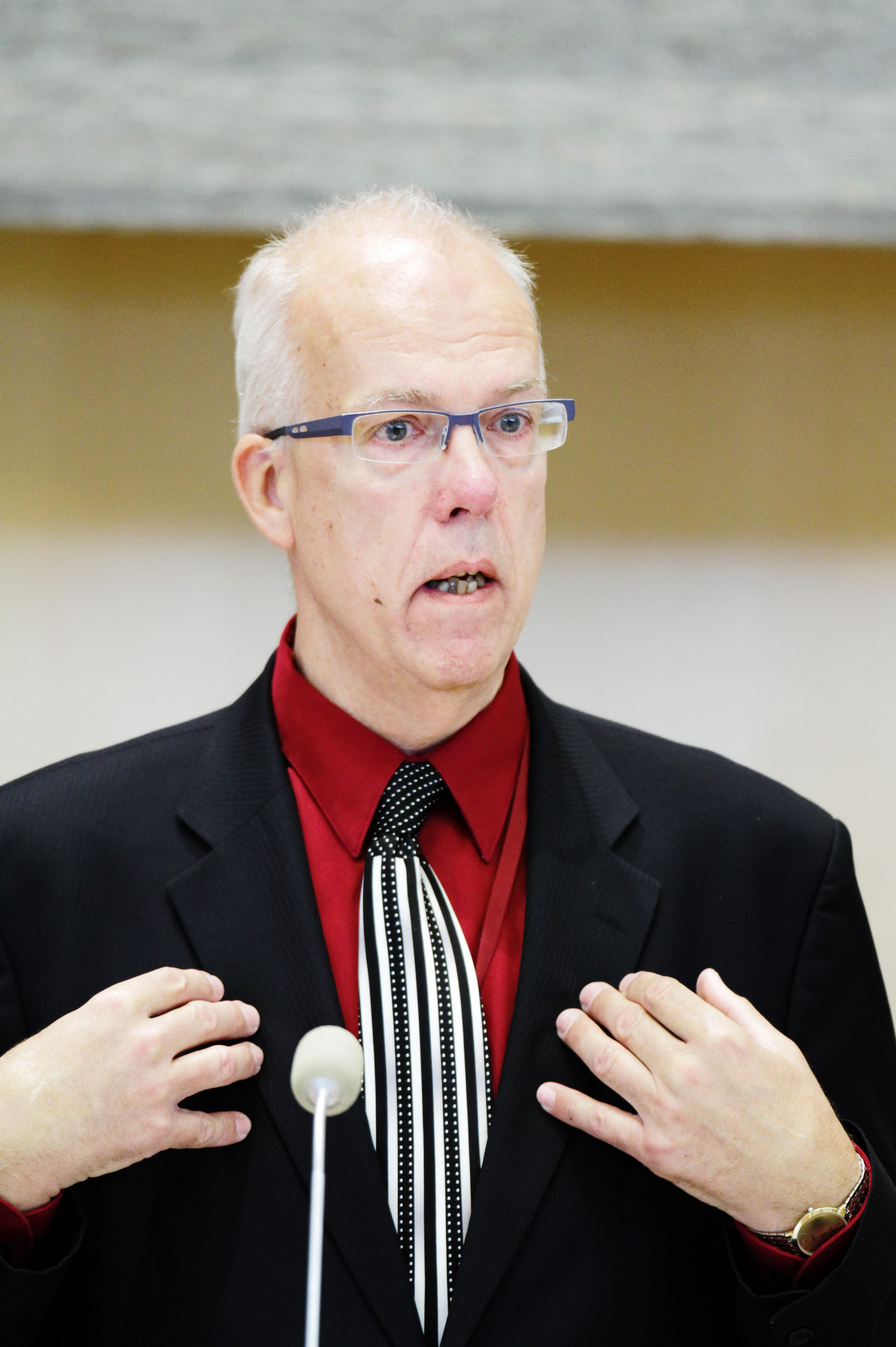 Göran Lindblad vid Nordiska Rådets session i Stockholm.